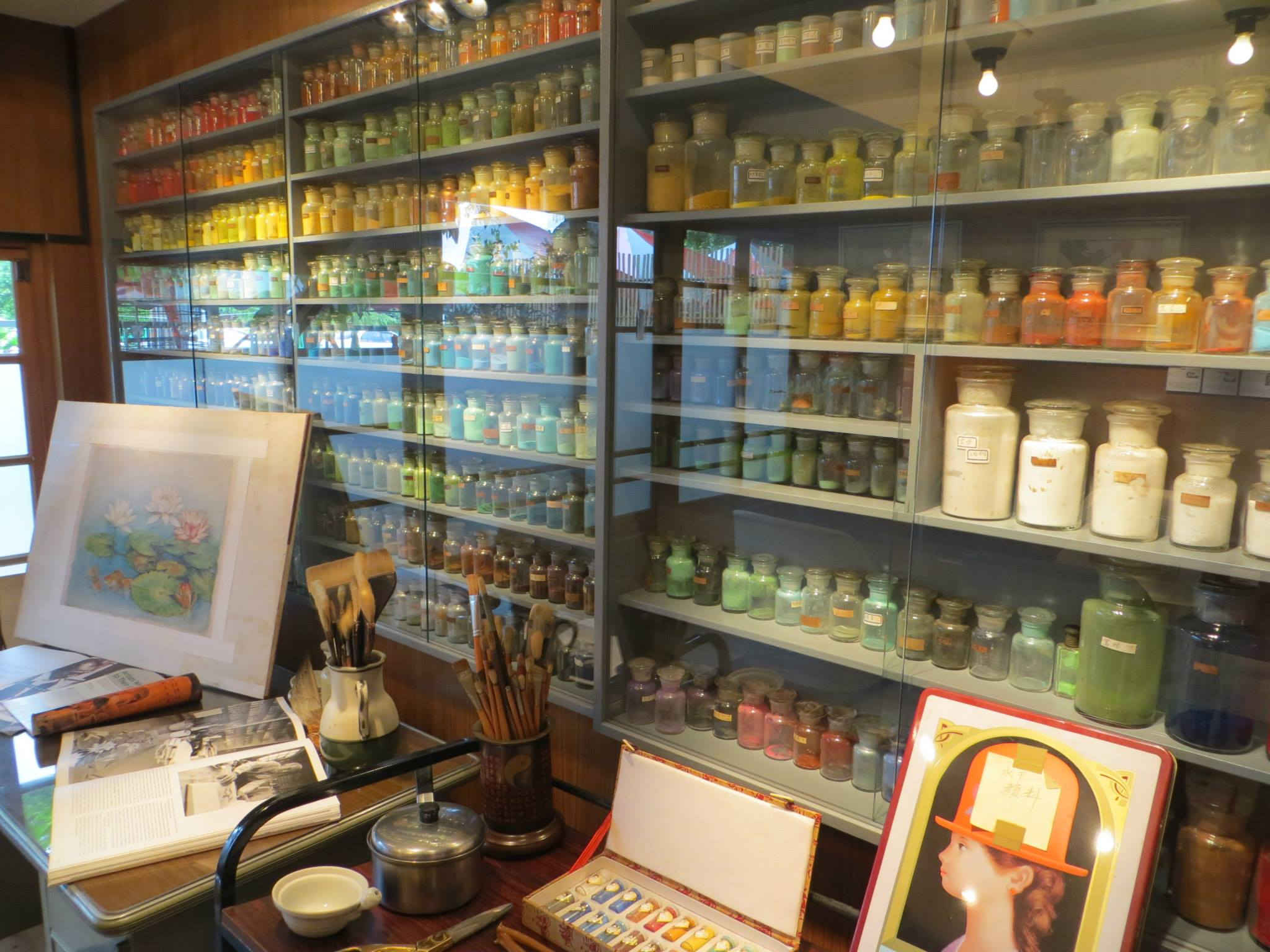 林之助紀念館中林之助畫室